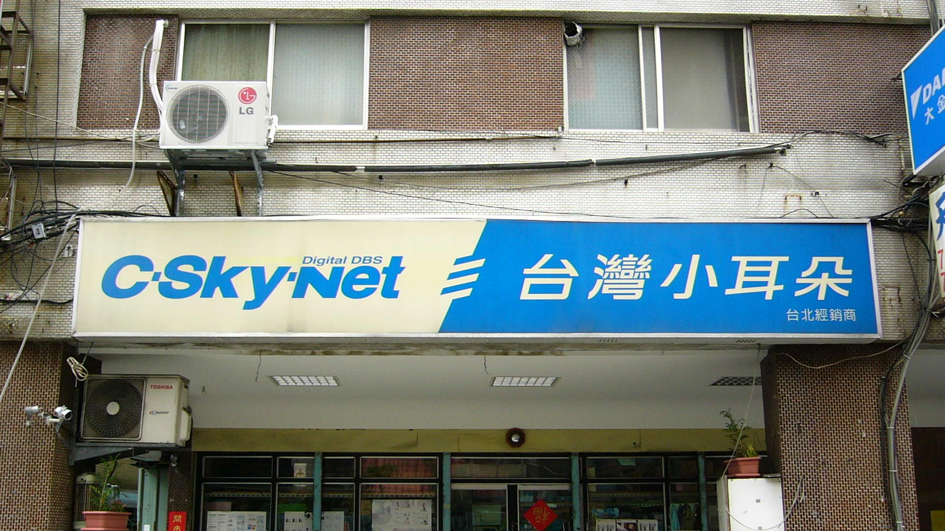 中文（台灣）: 台灣小耳朵（C-Sky-Net）台北經銷商橫式招牌。